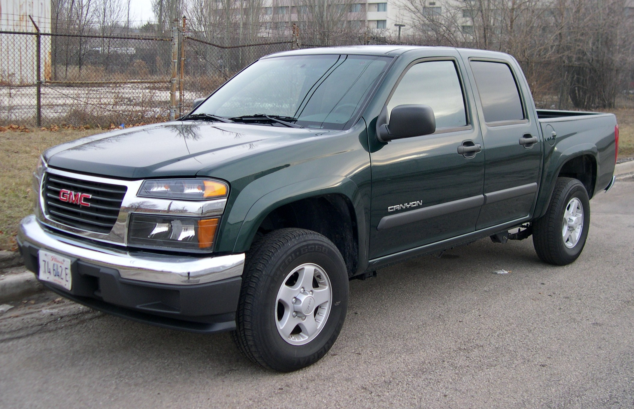 GMC Canyon